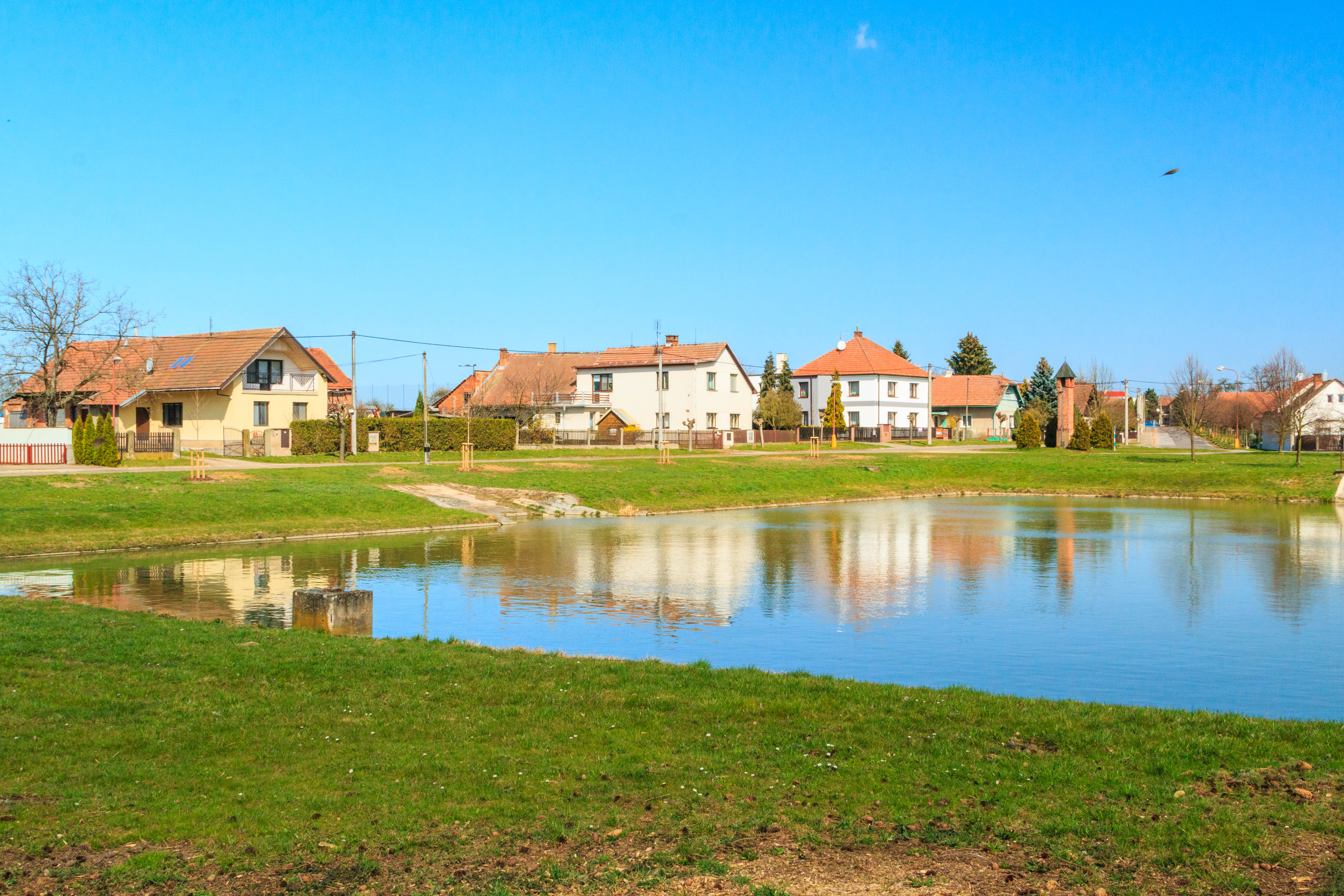 Rybník Návesník v Barchově Project: Vodstvo.